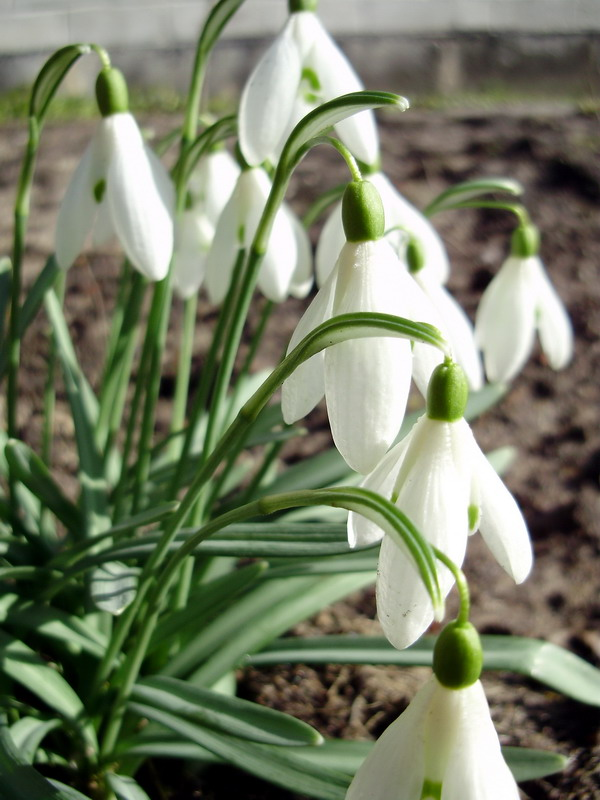 Galanthus nivalis. Veseluvka, Jonava district, Lithuania.